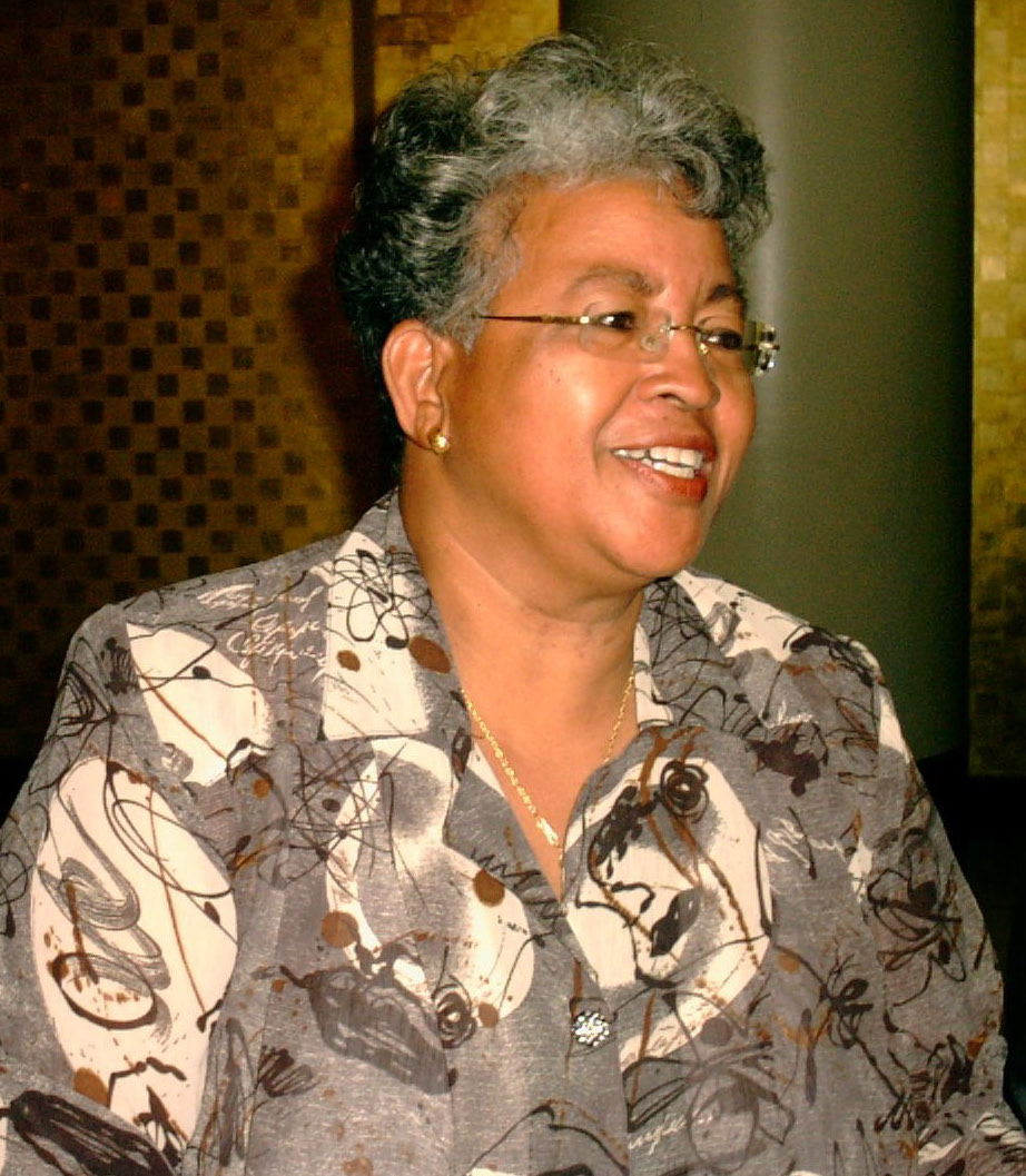 Cornelly Ensberg, eerste Surinaamse logopediste. Eigen opname, beschikbaar gesteld voor publiek domein.